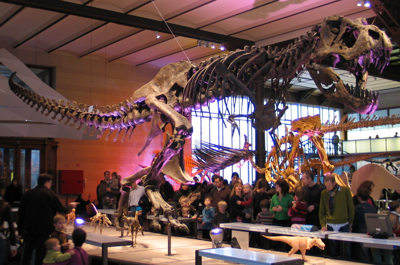 Tyrannosaurus Rex (specimen BHI 3033 aka "Stan") at the Museum voor Natuurwetenschappen in Brussels, Belgium